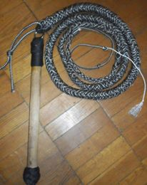 батіг(Stockwhip)